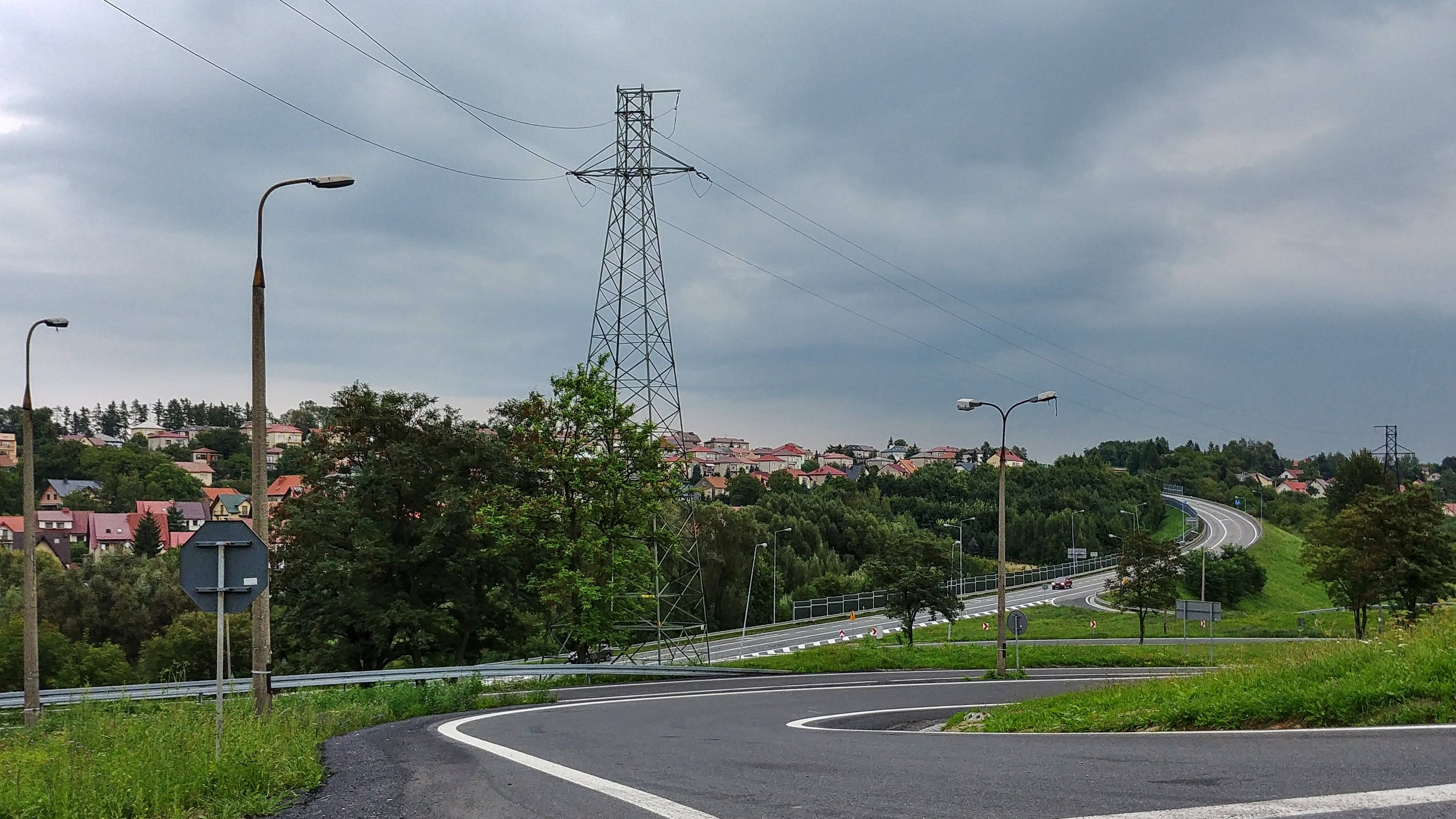 Węzeł ul. Wiśnickiej i DK nr 74 i 95